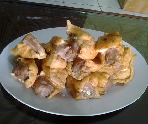 pentol tahu